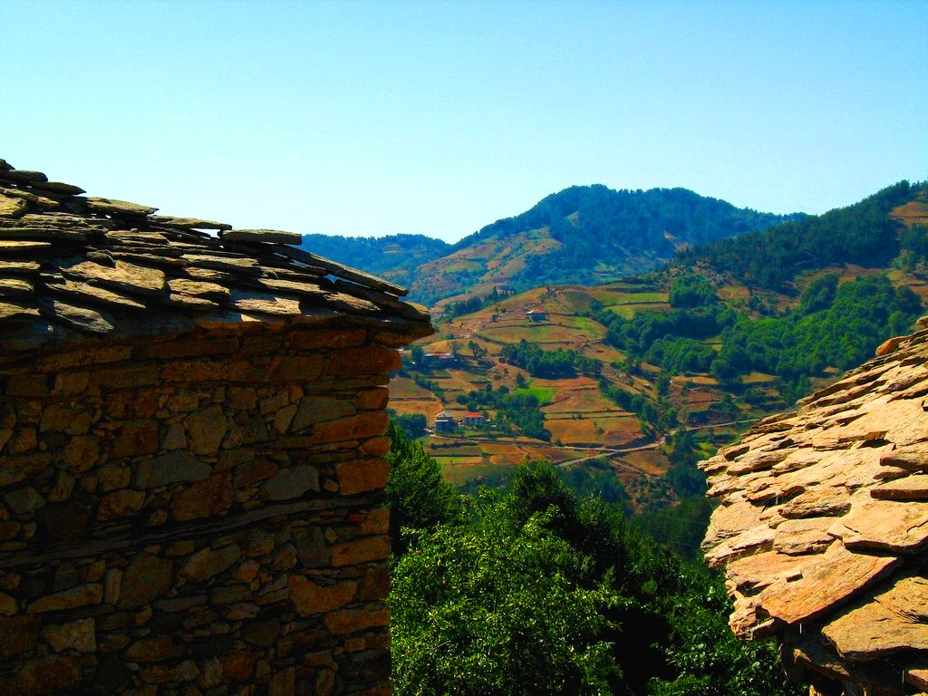 Стари къщи из Гърнати